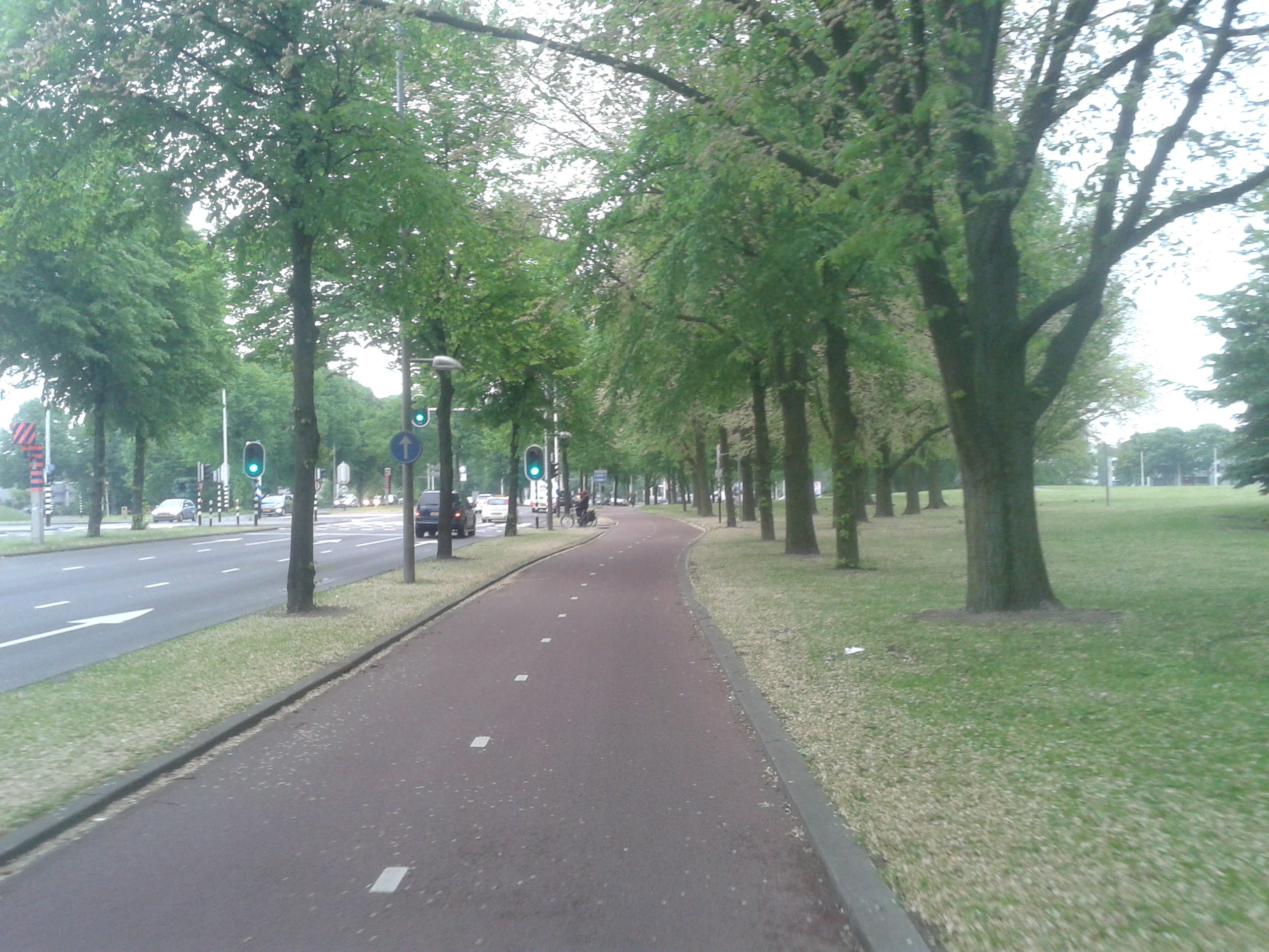 Rotterdam - 2013